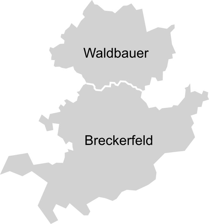 Die 2 Ortsteile Breckerfelds